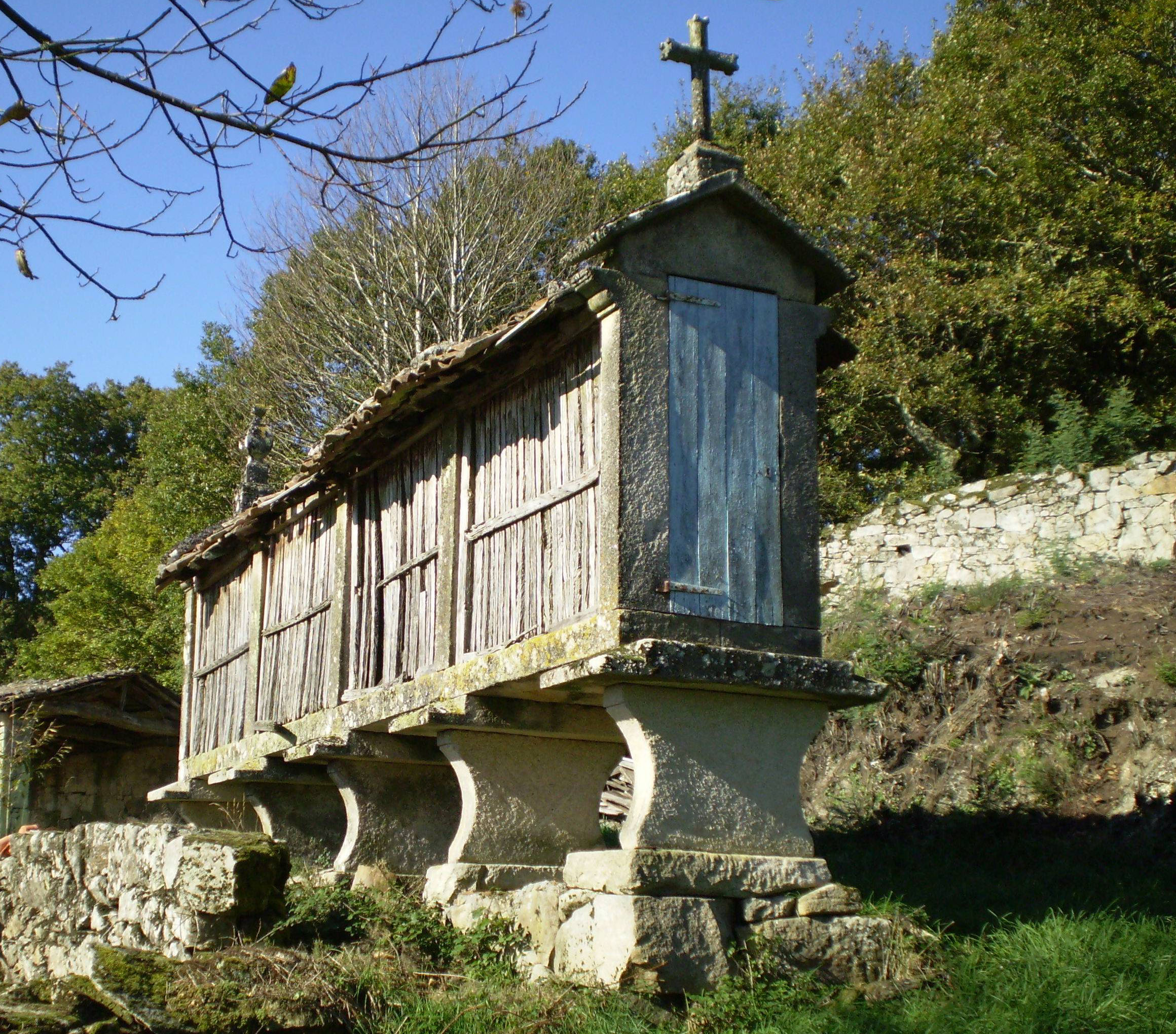 Hórreo tipo mahía, con cuberta de tella do país, adornado con cruz e lampeón fusiforme. Asentado sobre soleira de mampostería e 5 cepas. Ubicado no lugar de A Somoza (Antas de Ulla)